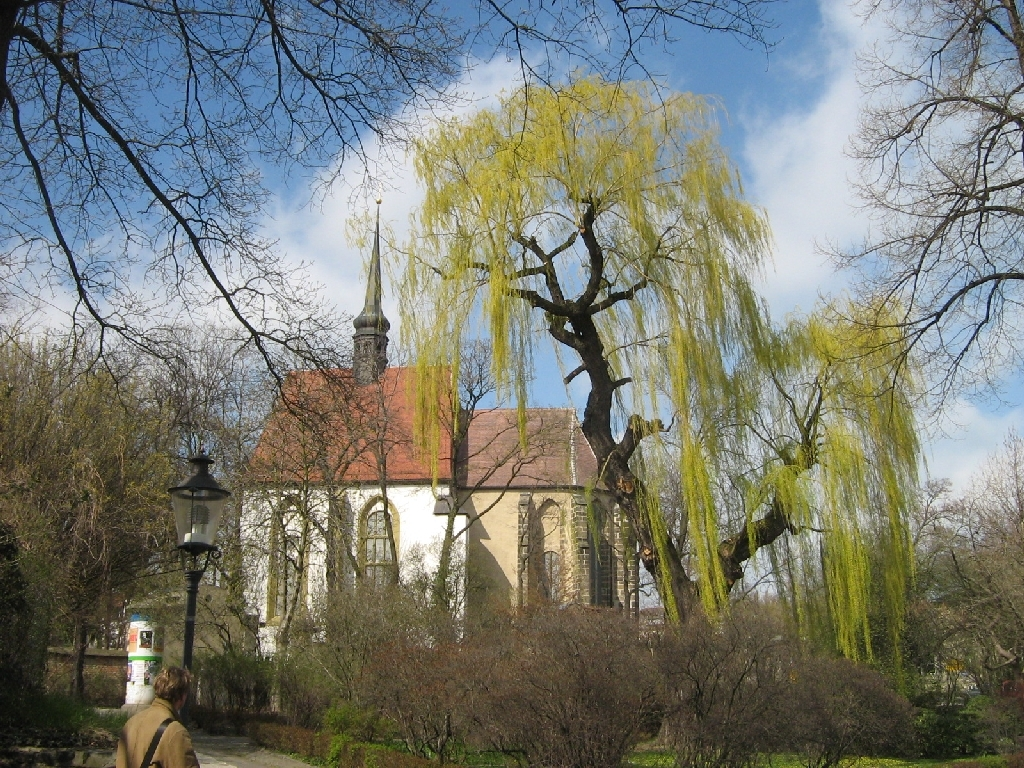 Zittau, Kirche zum Heiligen Kreuz, entweiht und jetzt Museum und Aufbewahrungsort des „Großen Zittauer Fastentuches“ von 1472 (das einzige seiner Art in Deutschland und mit 8,20 Meter Höhe und 6,80 Meter Breite das drittgrößte überlieferte Fastentuch überhaupt) vergl. Zittauer Fastentuch